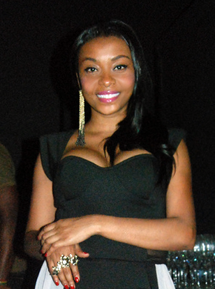 edição modificada do arquivo " African singer Celma Ribas on Belas Fashion Show, in November 19, 2011. Photography by me, Adler to Teekhaweb"